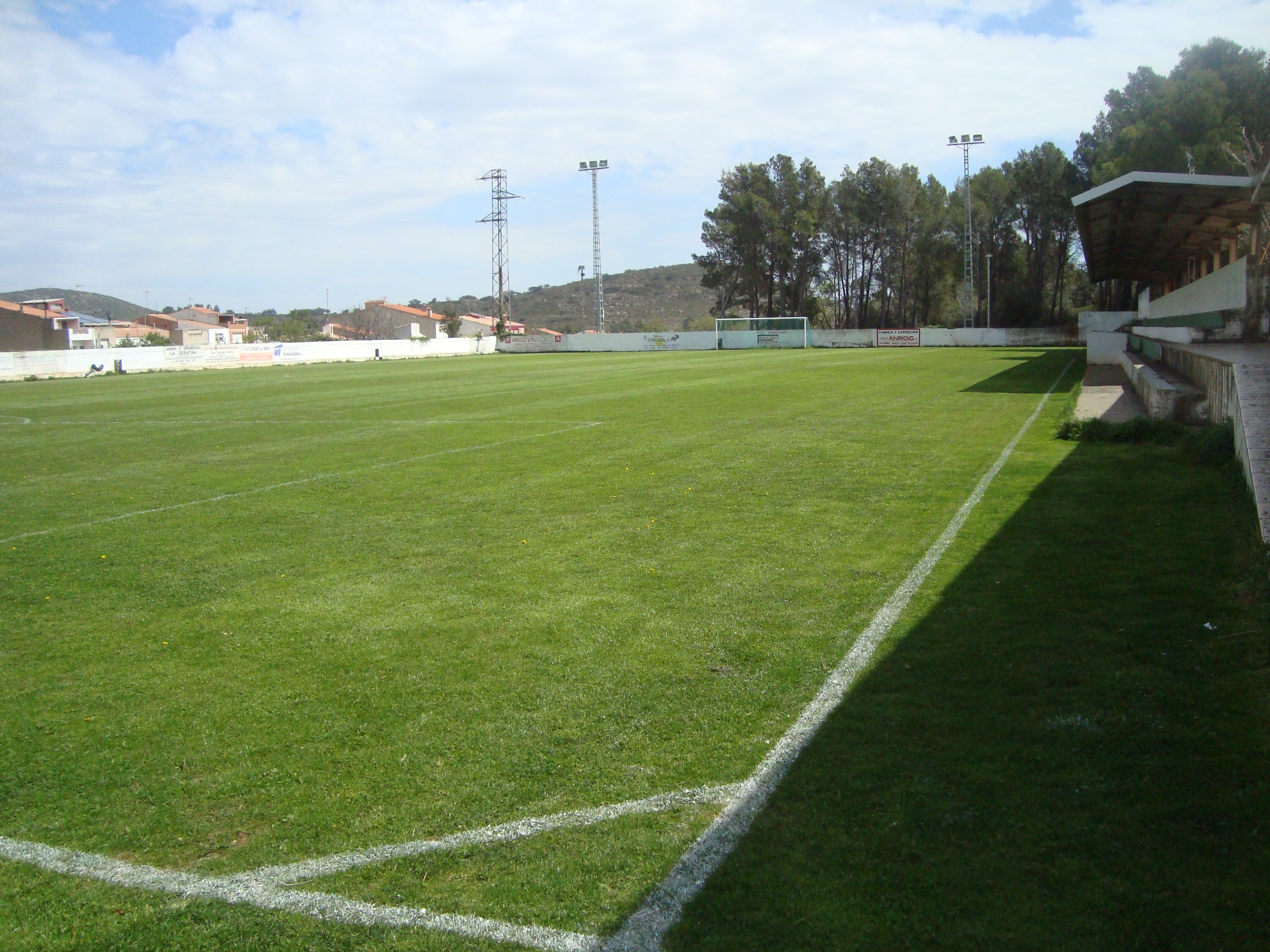 Campo de fútbol de Les Forques (Xert, Castellón)